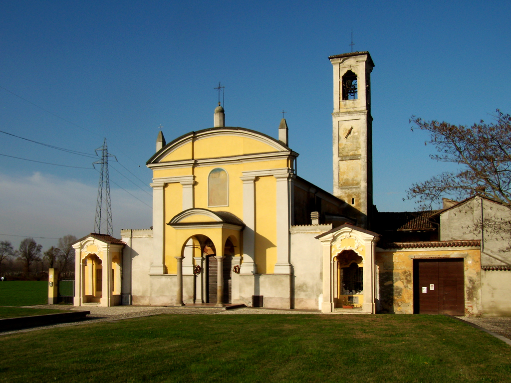 Chiesa parrocchiale di San Callisto Papa e Martire a Cornegliano Laudense.